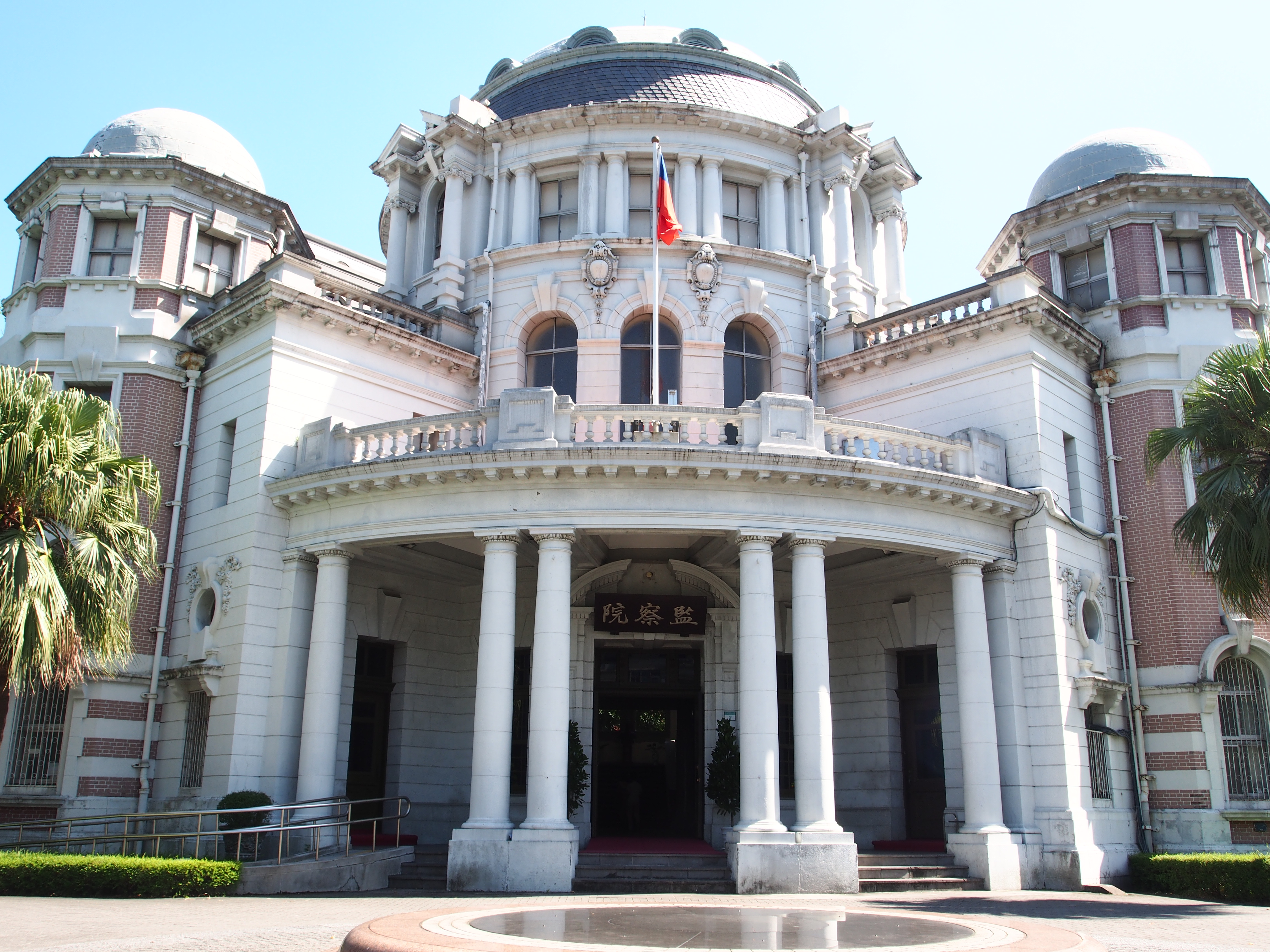 中華民國台北市中正區的監察院廳舍